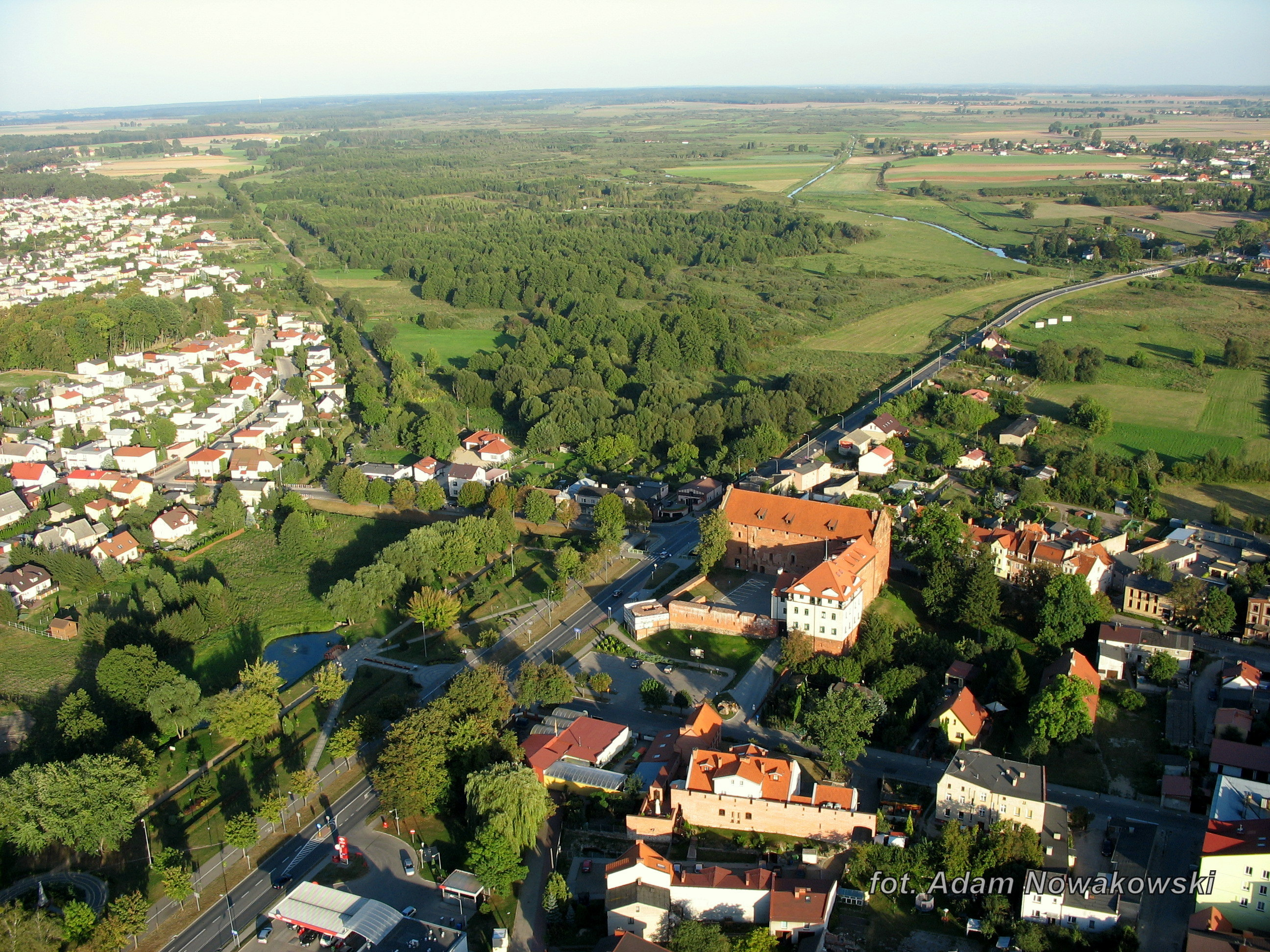 Działdowo, zamek krzyżacki